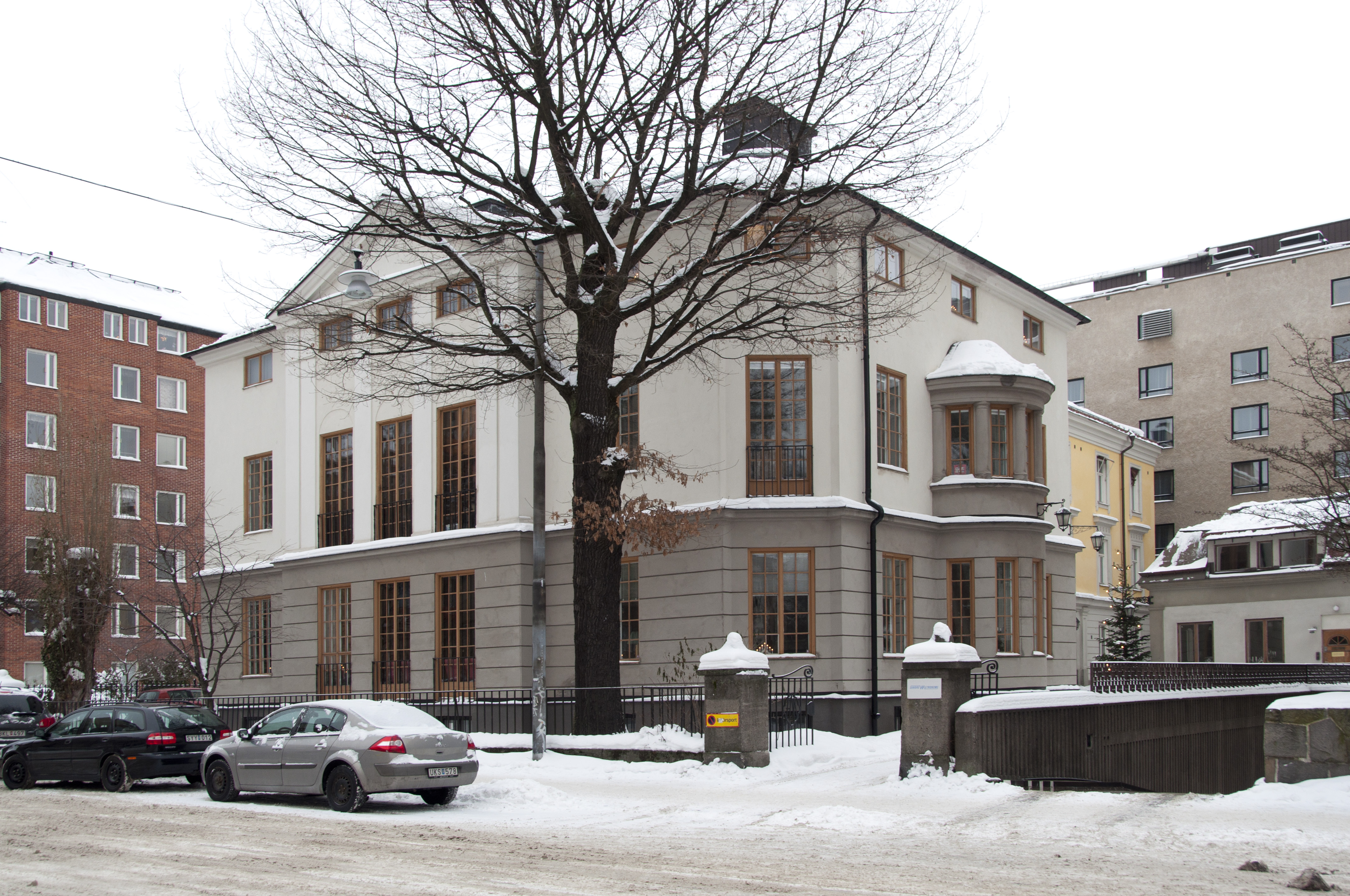 Floragatan 4, Bygggnadsår 1881-82, genomgripande ombyggnad 1917-19 Östlihn och Stark